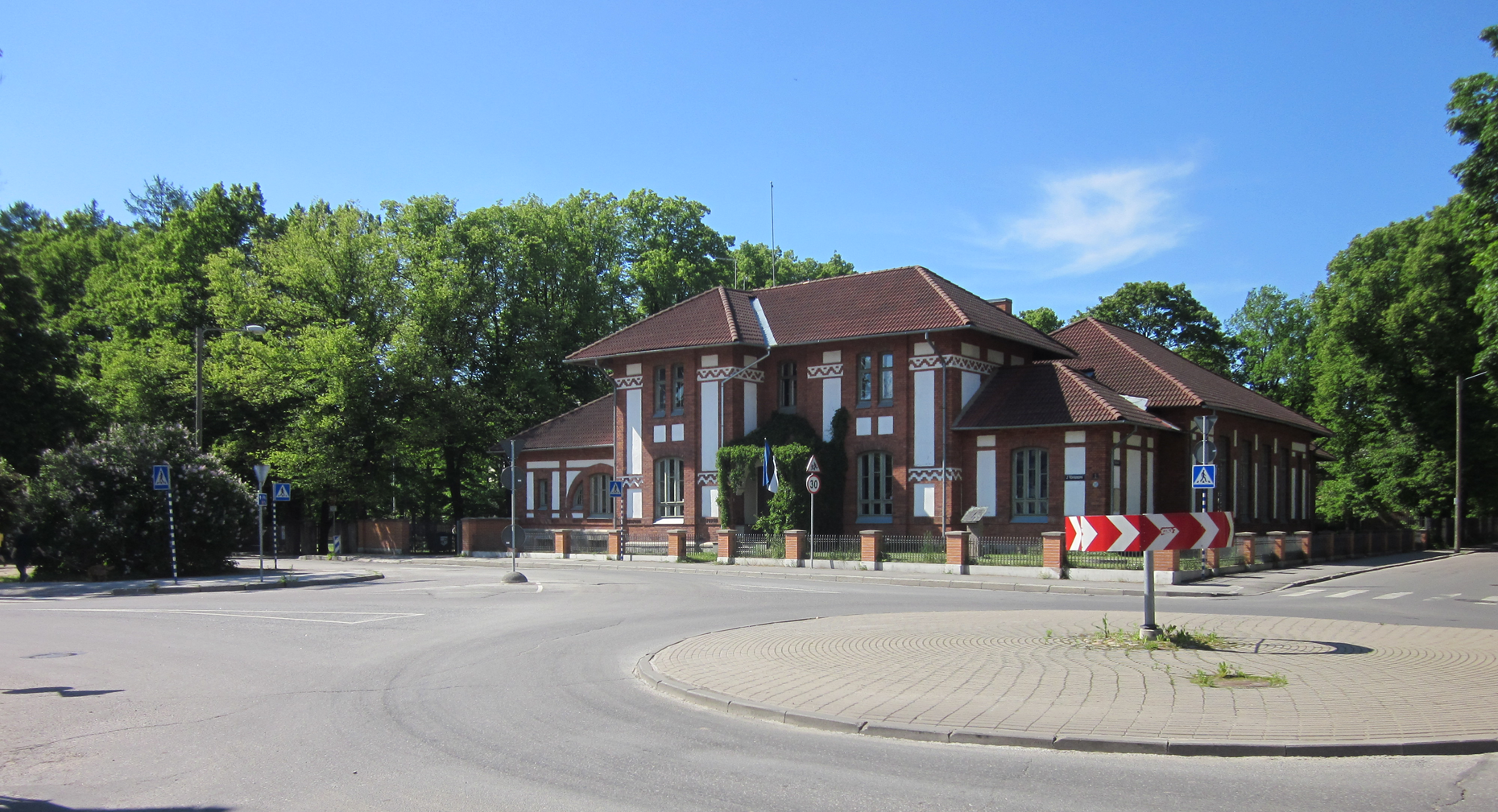 Tartu, J. Tõnissoni tn 1